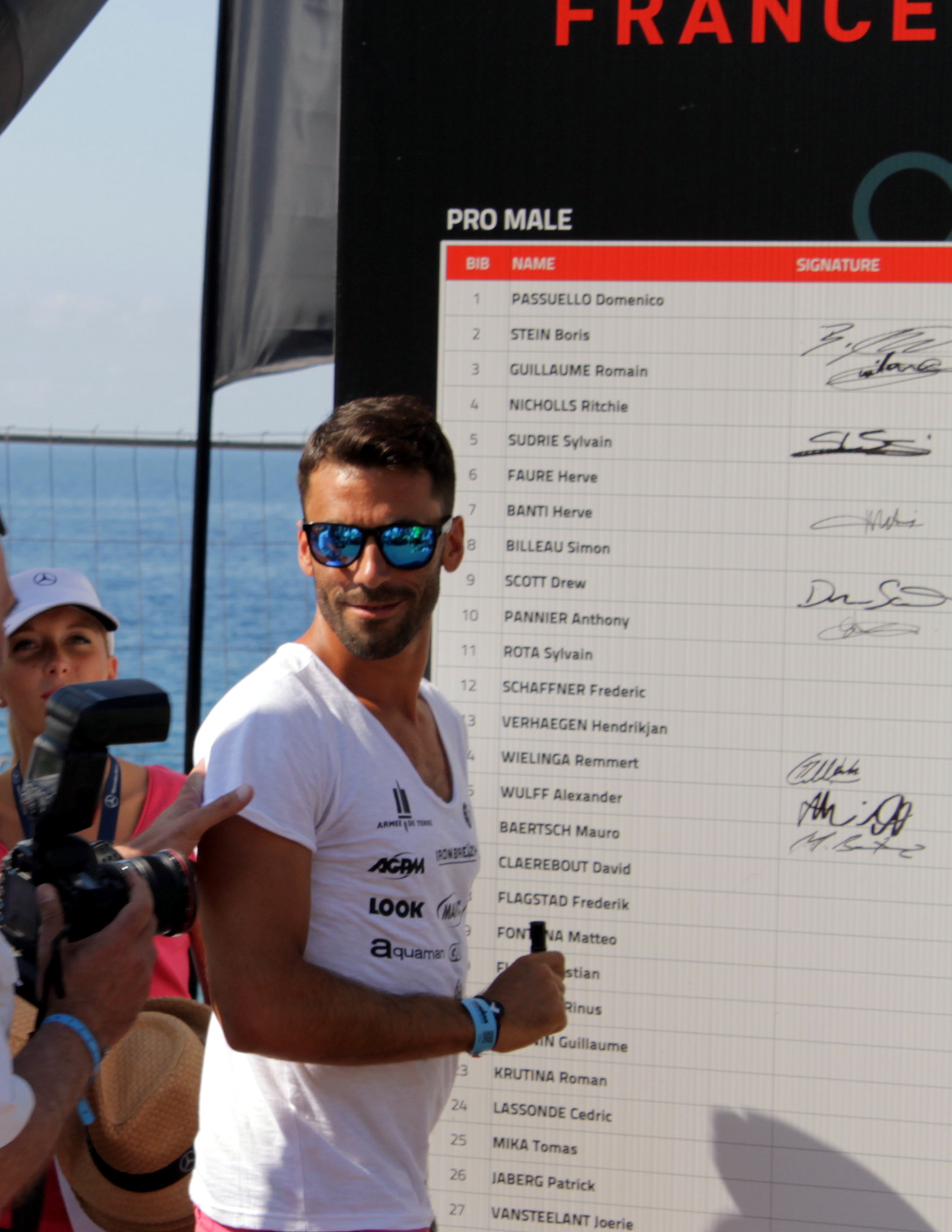 Ironman France . Nice 2015